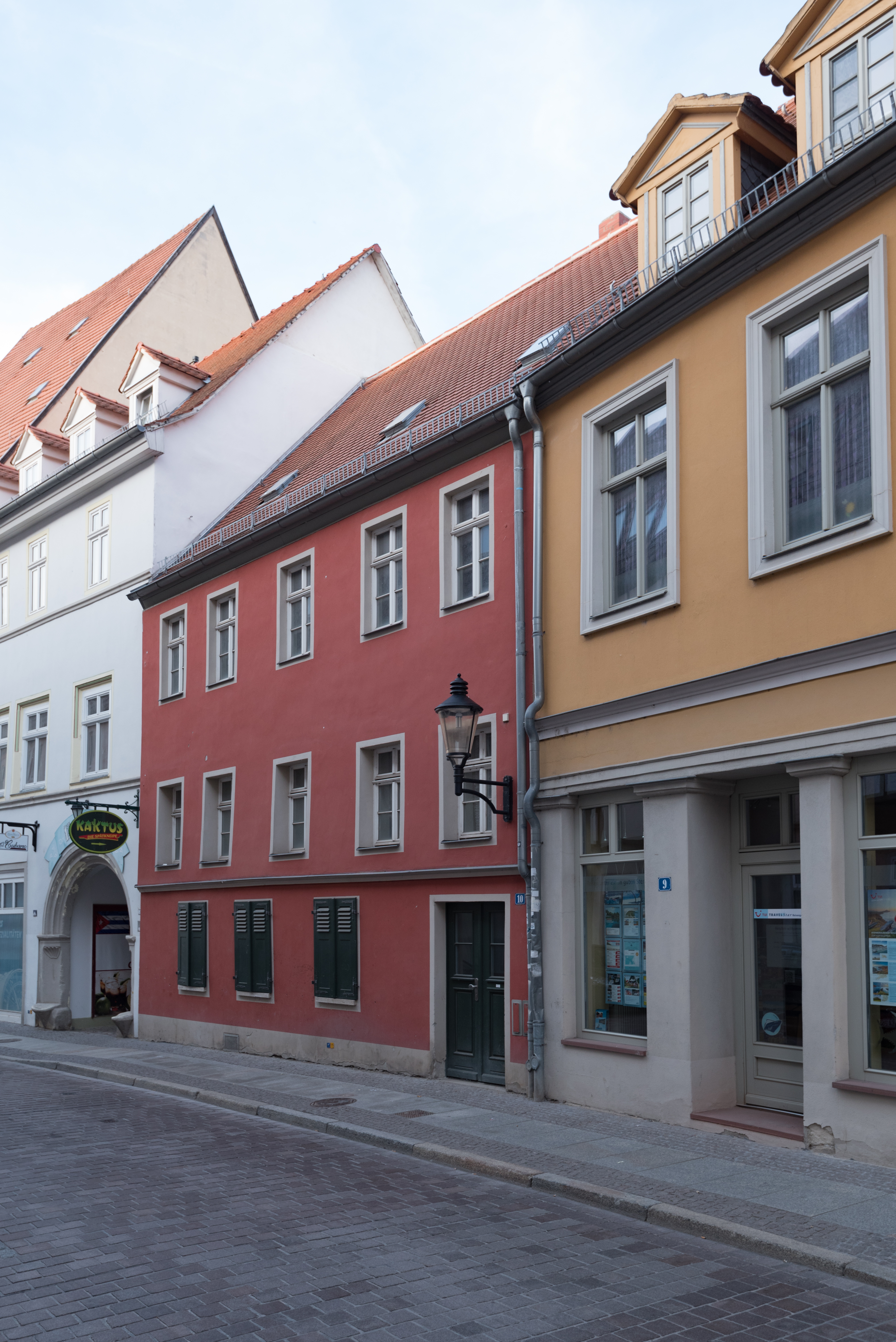 Naumburg (Saale), Marienstraße 10